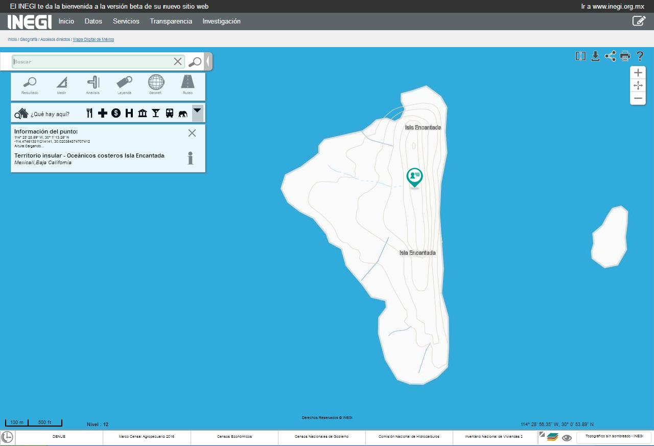 Representación cartográfica elaborado por el INEGI